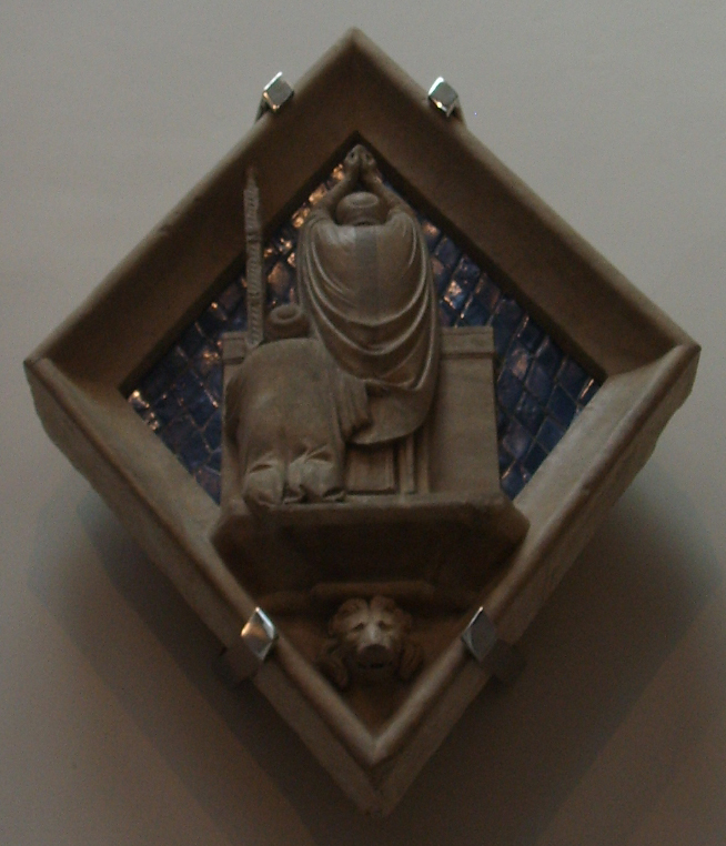 Losanga 27, eucarestia, maso di banco, 1337-1341